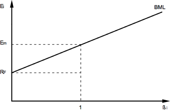 Balore Merkatu Lerroa